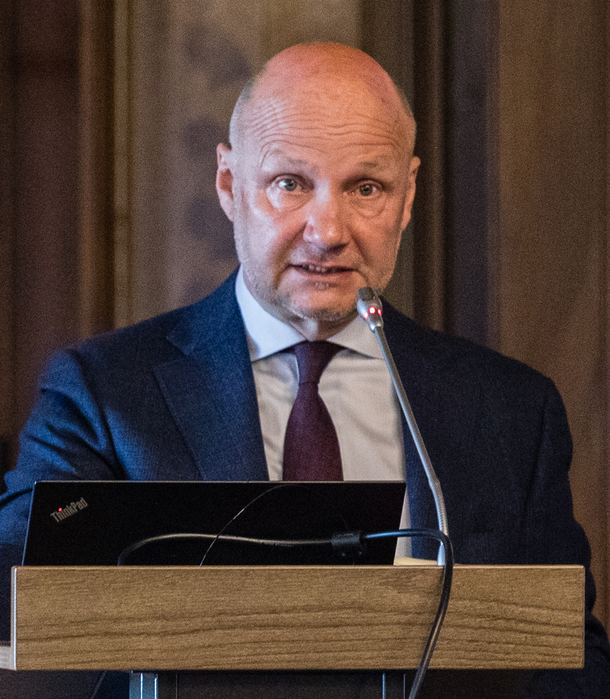 © Laura Kotila | valtioneuvoston kanslia